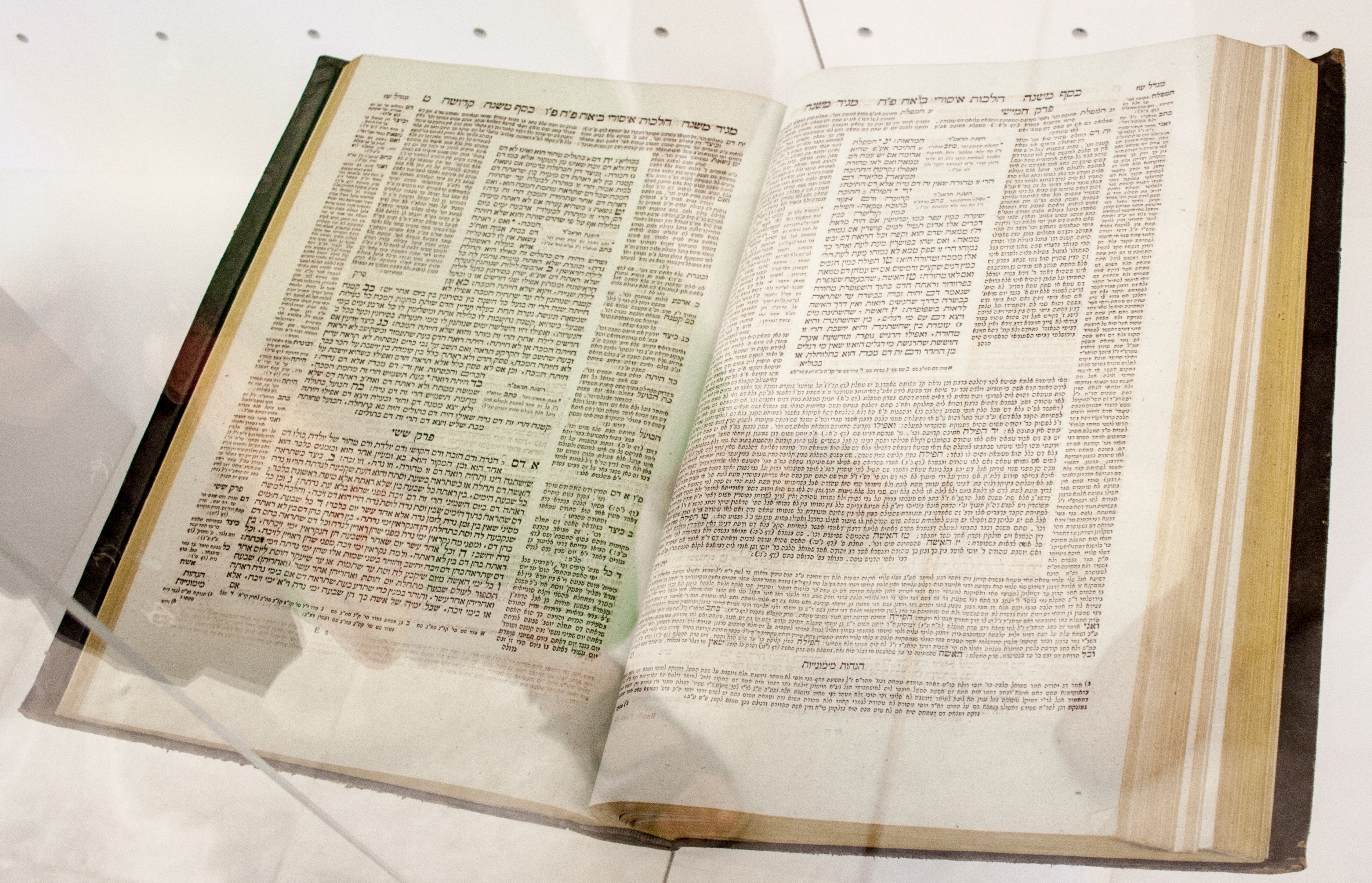 Halakhah